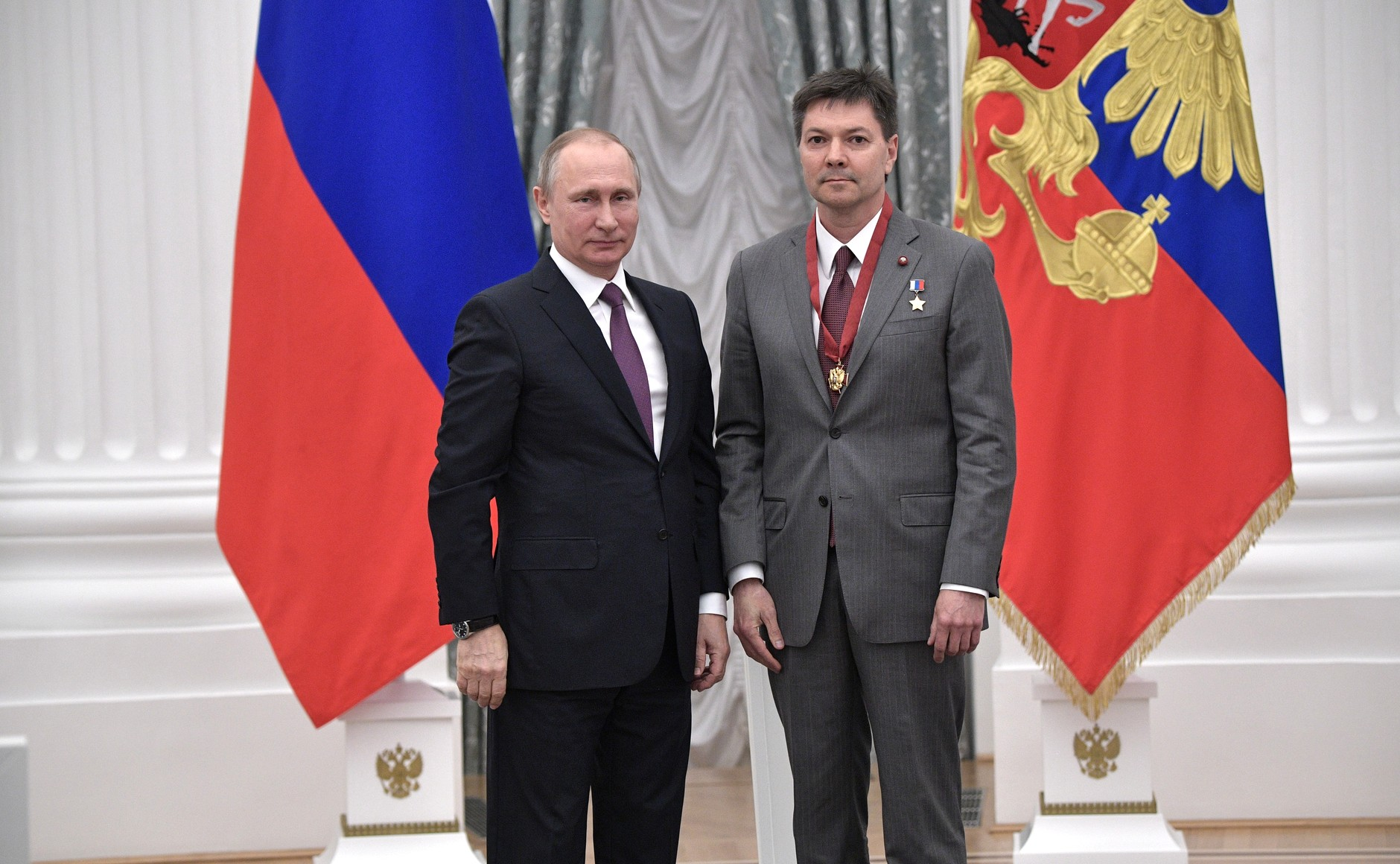 На церемонии вручения государственных наград. На церемонии вручения государственных наград. Орденом «За заслуги перед Отечеством» III степени награждён Олег Кононенко – инструктор-космонавт-испытатель Научно-исследовательского испытательного центра подготовки космонавтов имени Ю.А.Гагарина